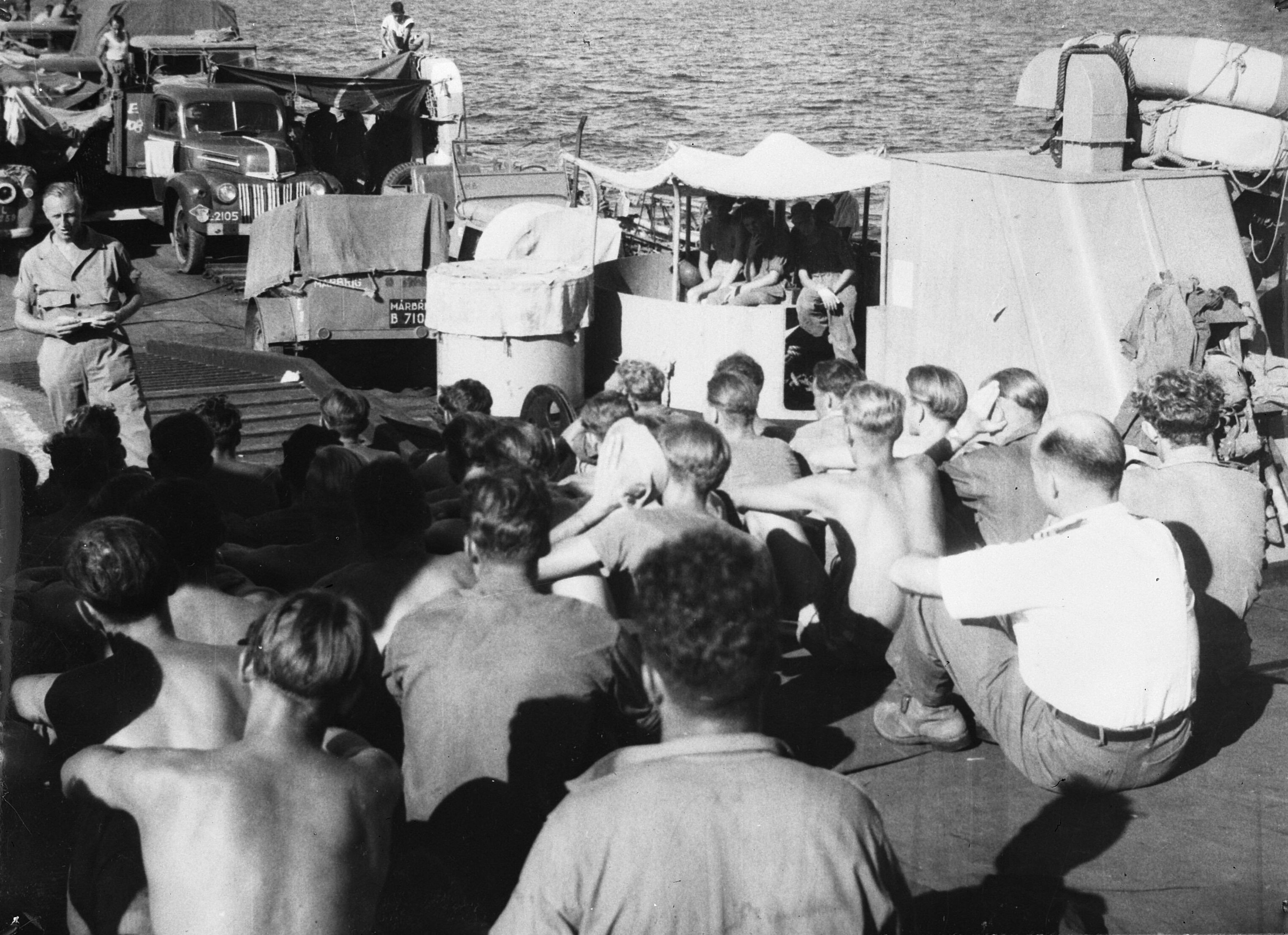 Collectie / Archief : Fotocollectie Anefo Reportage / Serie : [ onbekend ] Beschrijving : Politionele actie in Indonesie Datum : 30 december 1948 Locatie : Indonesië Trefwoorden : ACTIE Fotograaf : Noske, J.D. / Anefo Auteursrechthebbende : Nationaal Archief Materiaalsoort : Glasnegatief Nummer archiefinventaris : bekijk toegang 2.24.01.09 Bestanddeelnummer : 903-1755